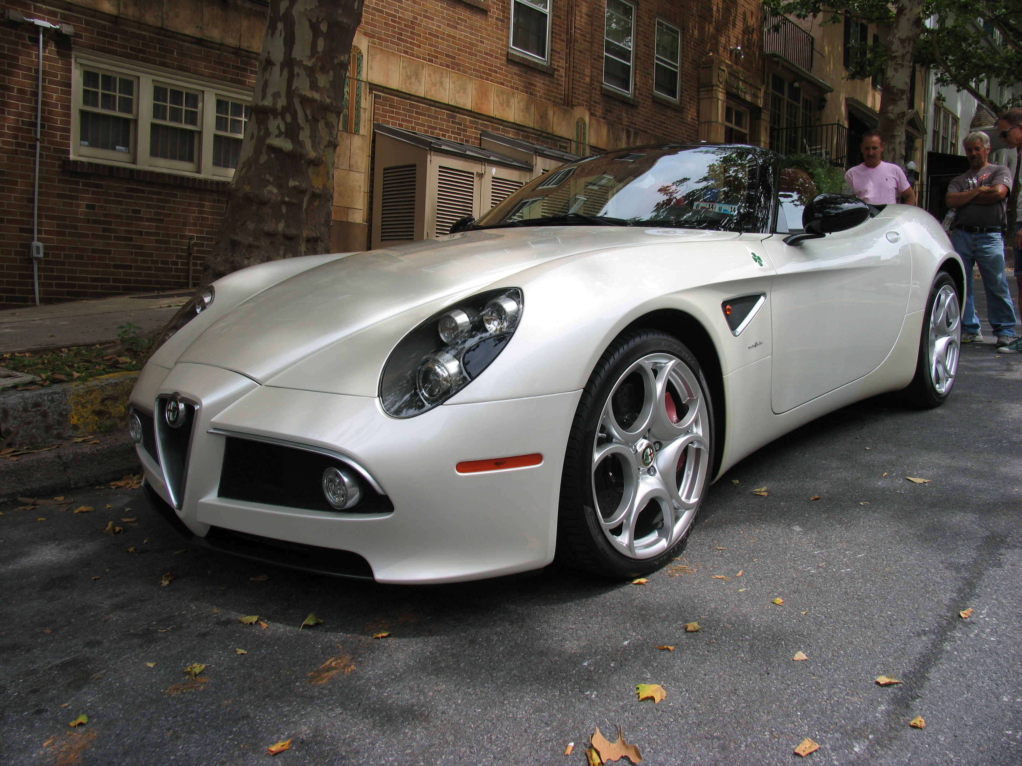 Alfa Romeo 8C Competizione Spyder